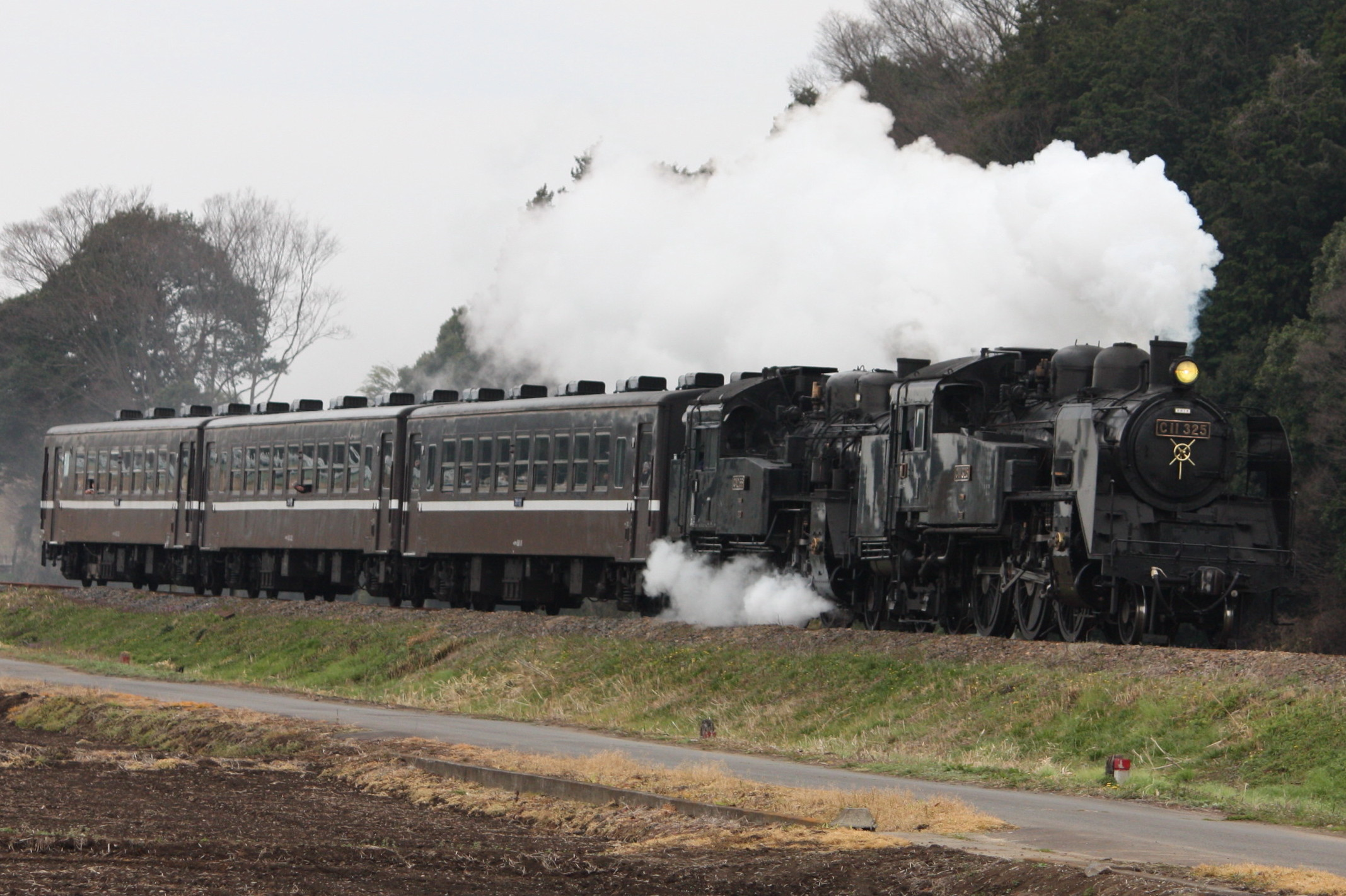 真岡鐵道 C11 325+C12 66によるSLもおか号重連運転 寺内‐真岡間にて